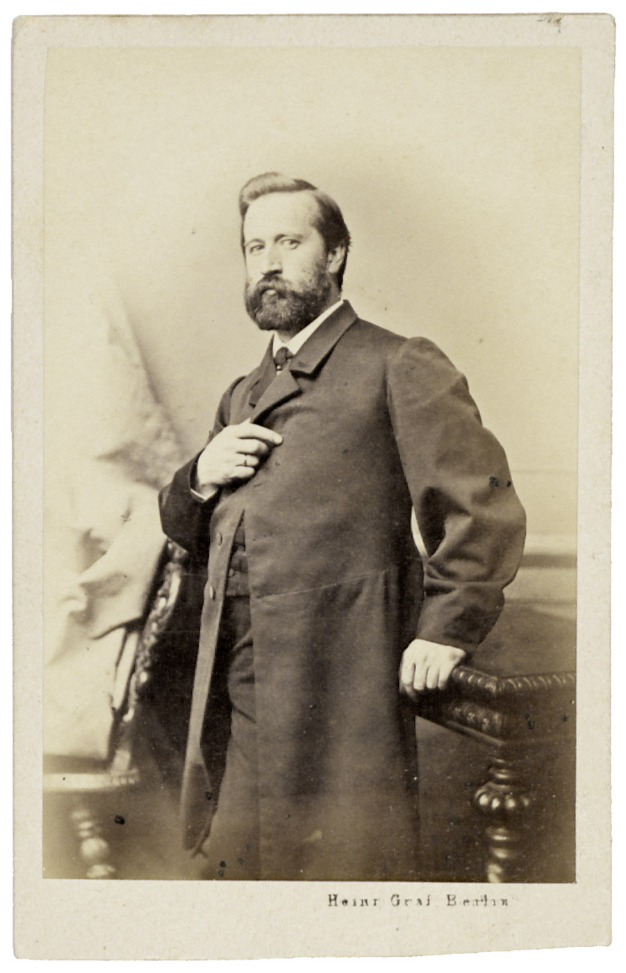 Ludwig Knaus, sculptor. Circa 8,5 x 5,5 cm.